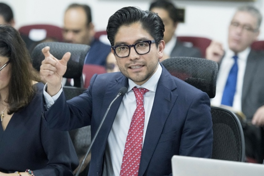 Jose Luis Romo Cruz